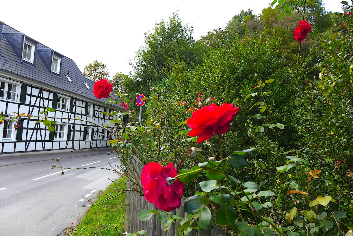 "Тропа Клинка" - туристский маркированнный маршрут вокруг немецкого города Золинген (Северный Рейн-Вестфалия). Шестой этап: вдоль реки Вуппер. 8.0 км.